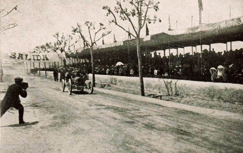 Giosuè Giuppone vainqueur de la Coupe de Catalogne en 1908, sur Peugeot-Lion (première épreuve automobile internationale en Espagne, pour voiturettes) - La Vie au Grand Air du 13 juin 1908, p.374